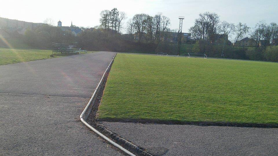 Kelmės stadionas